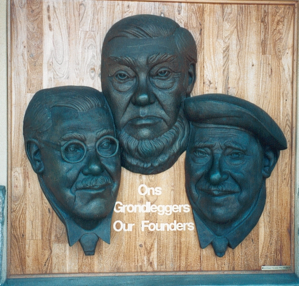 'n Beeldhouwerk by die ontvangsarea van Skukuzakamp in die Krugerwildtuin. Van links na regs: Piet Grobler, Paul Kruger, en James Stevenson-Hamilton.